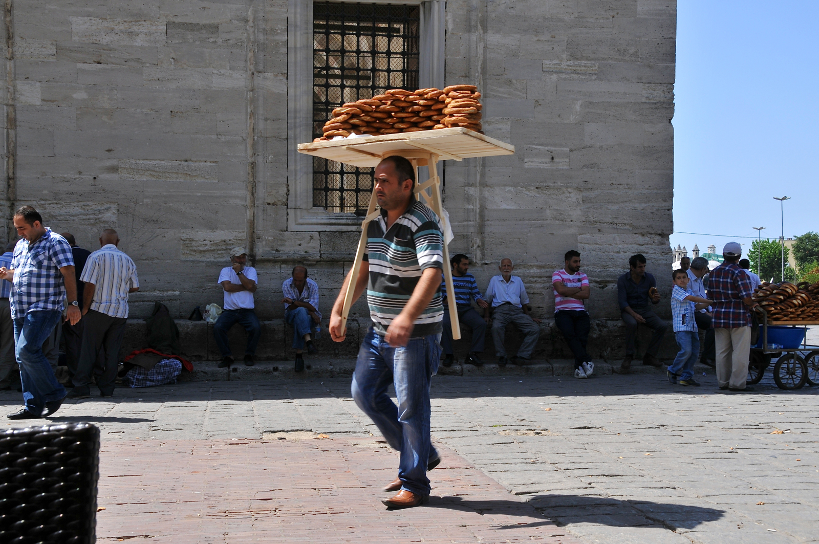 Simit vendor in Istanbul.